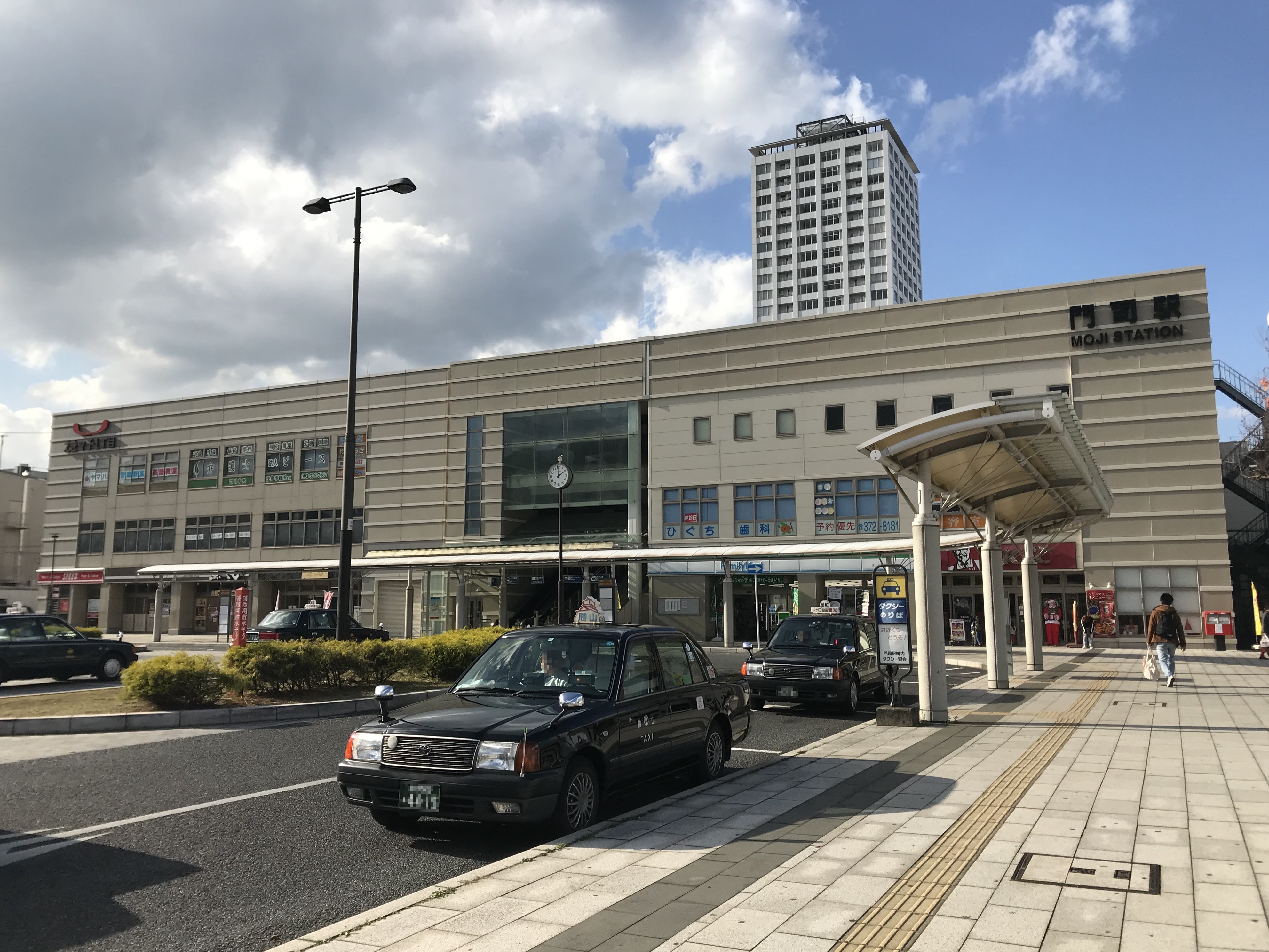 門司駅の駅舎